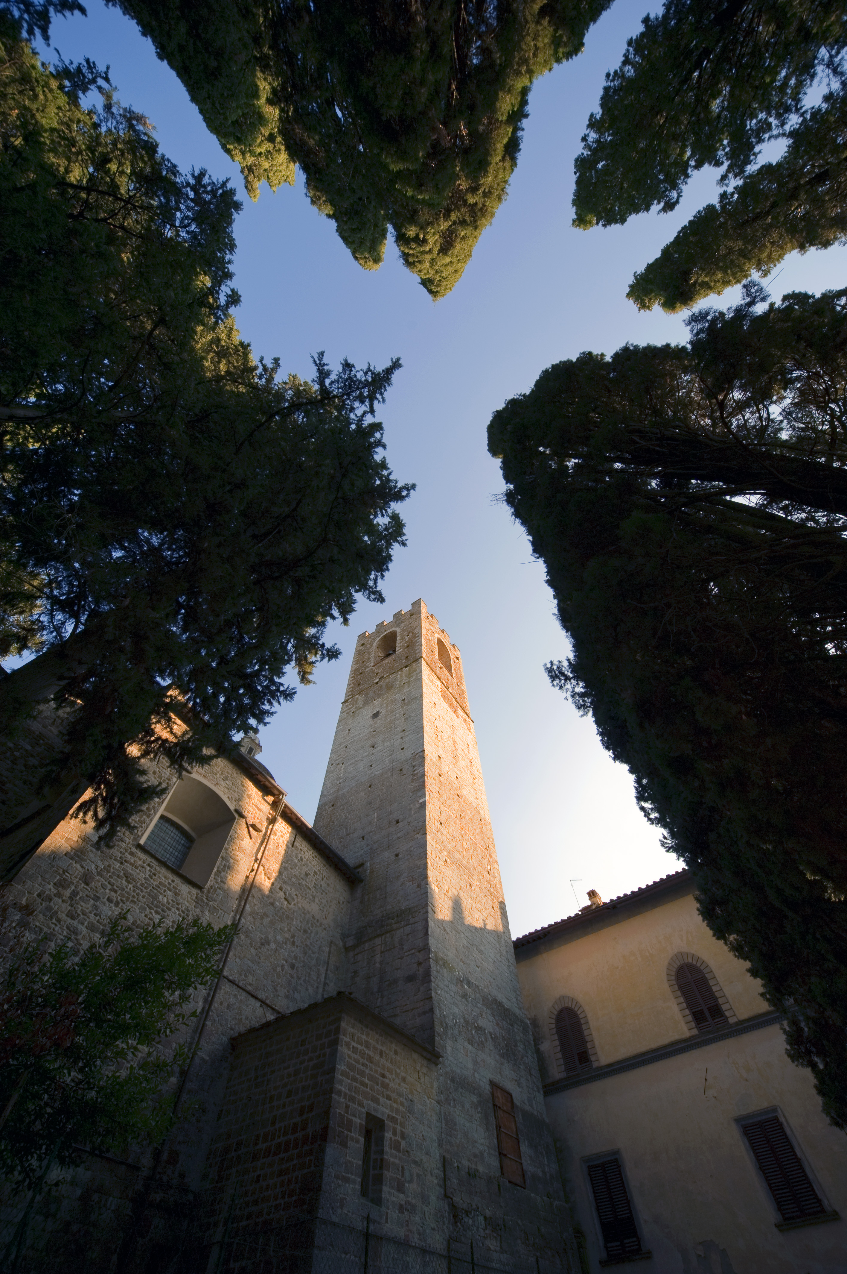 Campanile della Abbazia di Passignano, Tavarnelle Val di Pesa